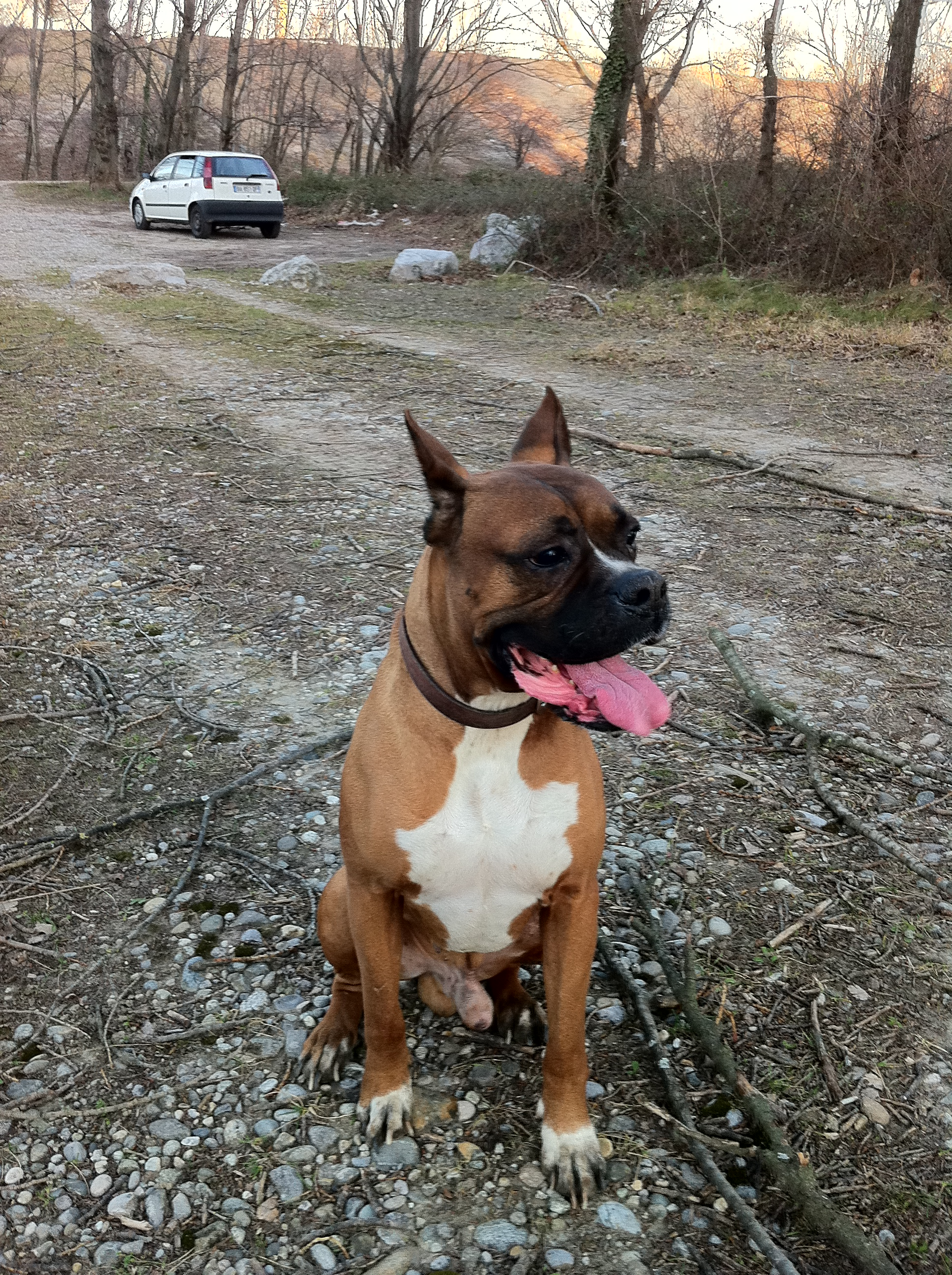 Chien boxer mâle